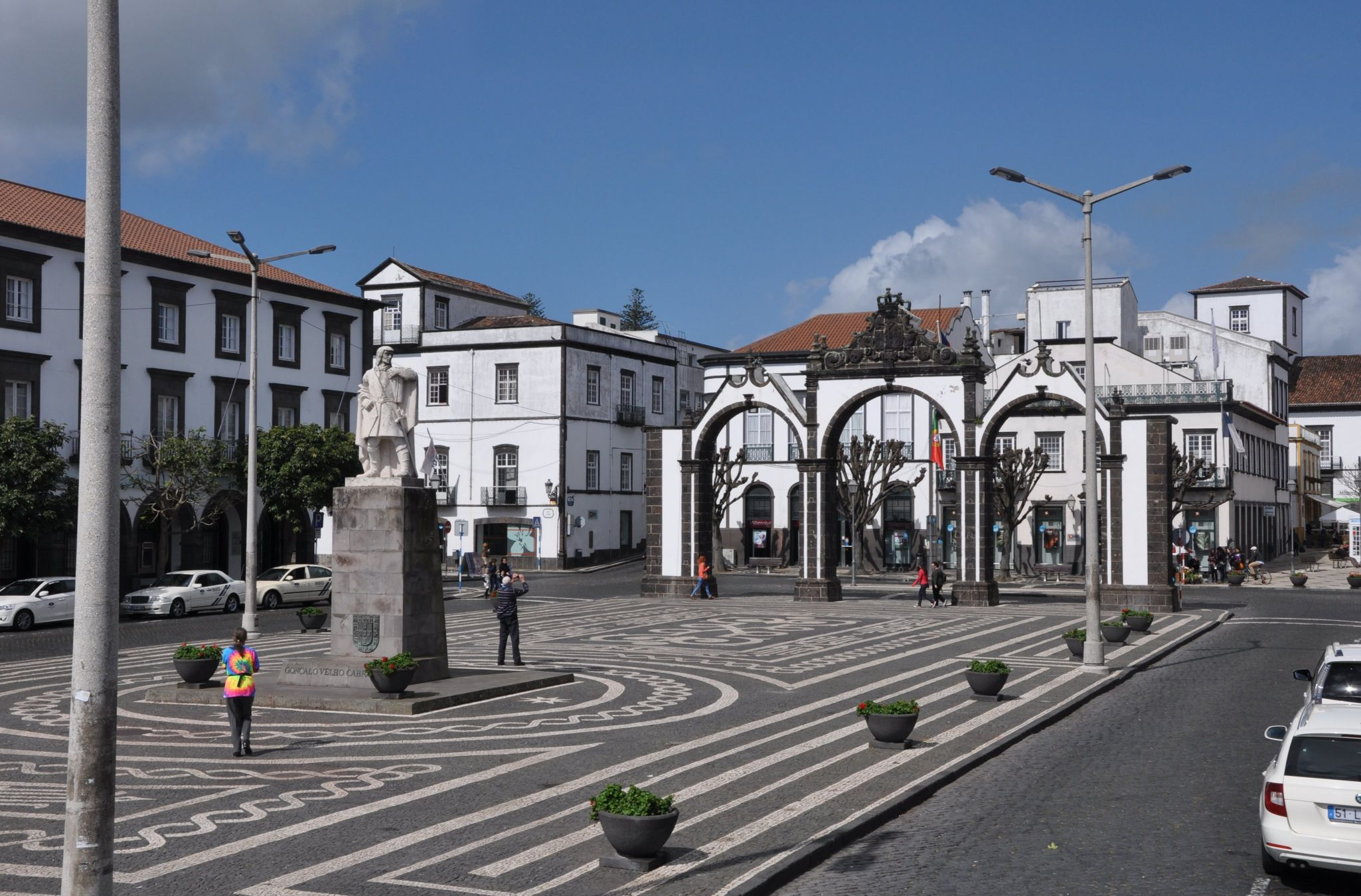 Praço Gonçalo Velho Cabral, Ponta Delgada